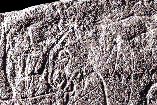 Gravure sur plaquette de schiste de la Madeleine en Dordogne, France. Il s'agit de la représentation d'un lynx.